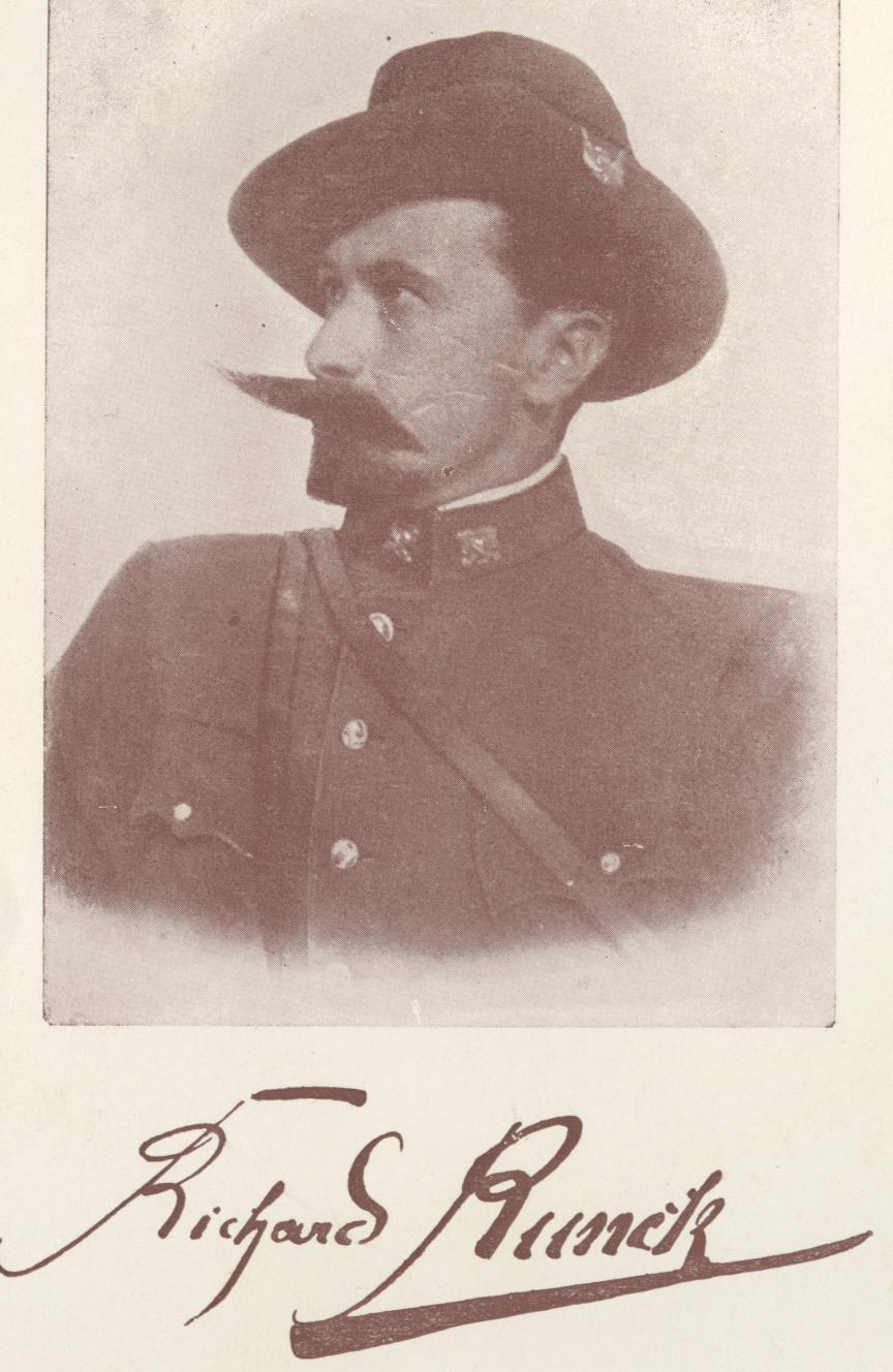 Richard Runck, Kommandant eines deutschen Freikorps im Burenkrieg